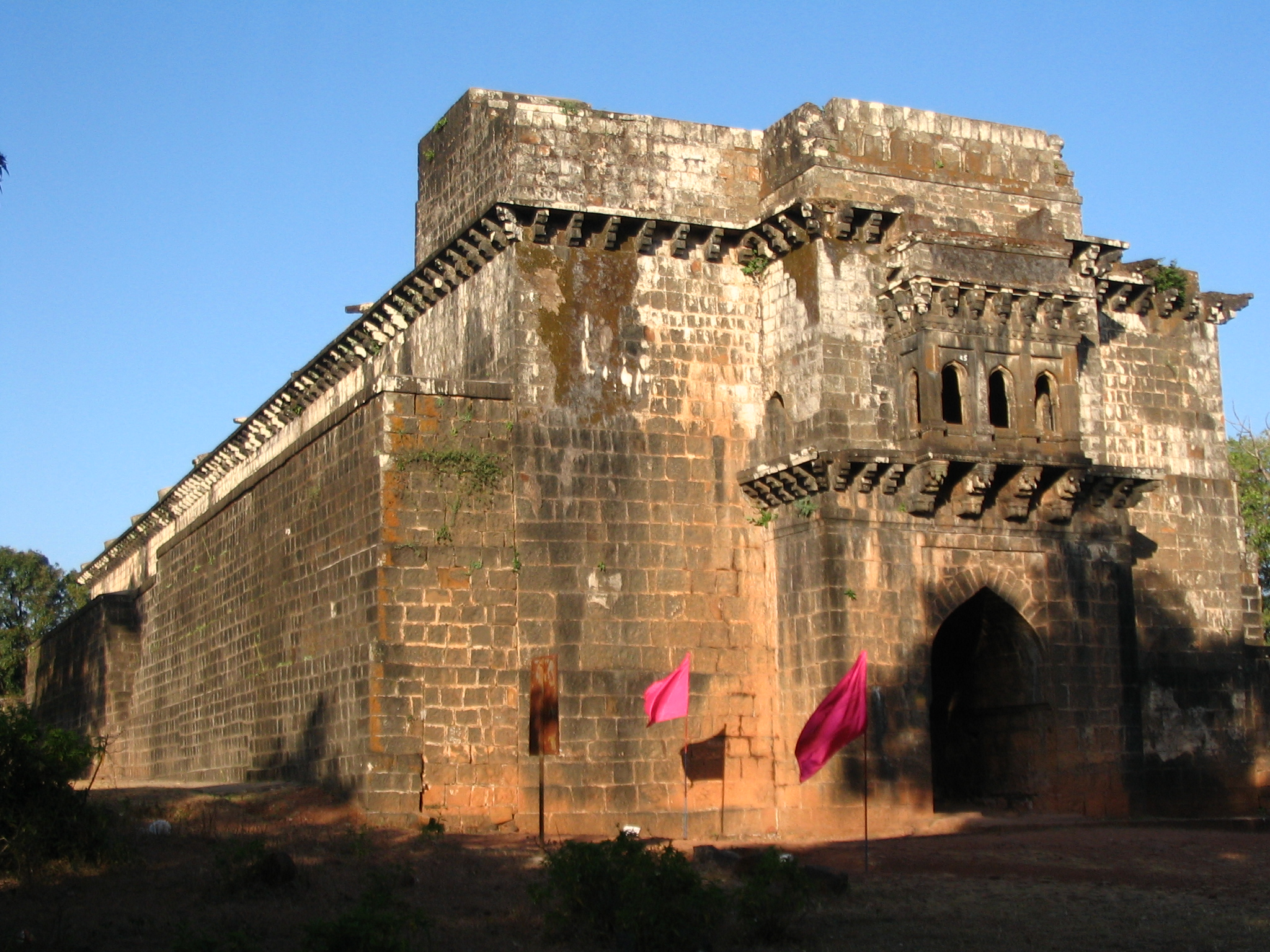 Ambarkhana (Godown?) on Pahala Fort, Maharashtra, India